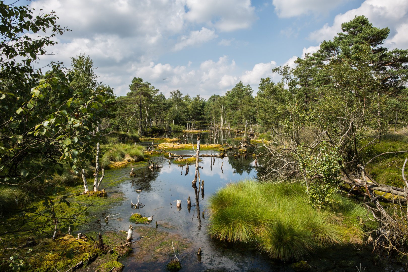 Soltauer Moorgebiet – wo genau, Schutzgebiet?